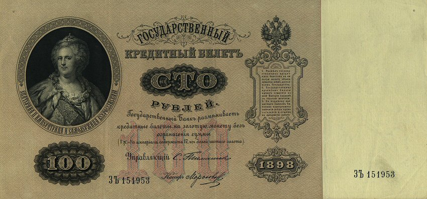 100 рублей 1898 года. Аверс.